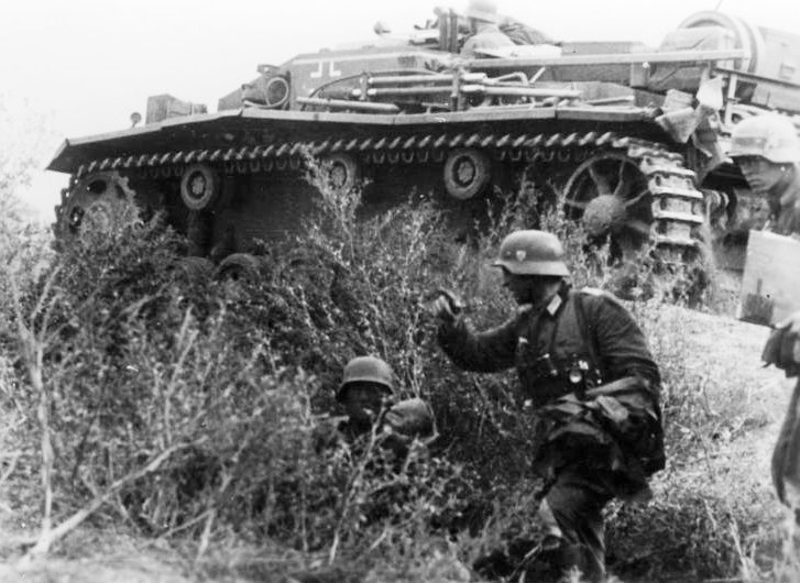 Russland, Kampf um Stalingrad, Infanterie An der Sowjetfront: Infanterie vor Stalingrad.- Infanterie und Sturmgeschütze in der Bereitstellung zum Angriff auf die Höhe 102 zwischen dem Stadtzentrum und dem Industrieviertel Barikady. PK-Aufnahme: Kriegsberichter Herber (Sch) 5317-42 "Fr. Fr. OKW" September 1942 [Herausgabedatum] [Sowjetunion.- Schlacht um Stalingrad.- Infanteristen neben Sturmgeschütz III (StuG III)]